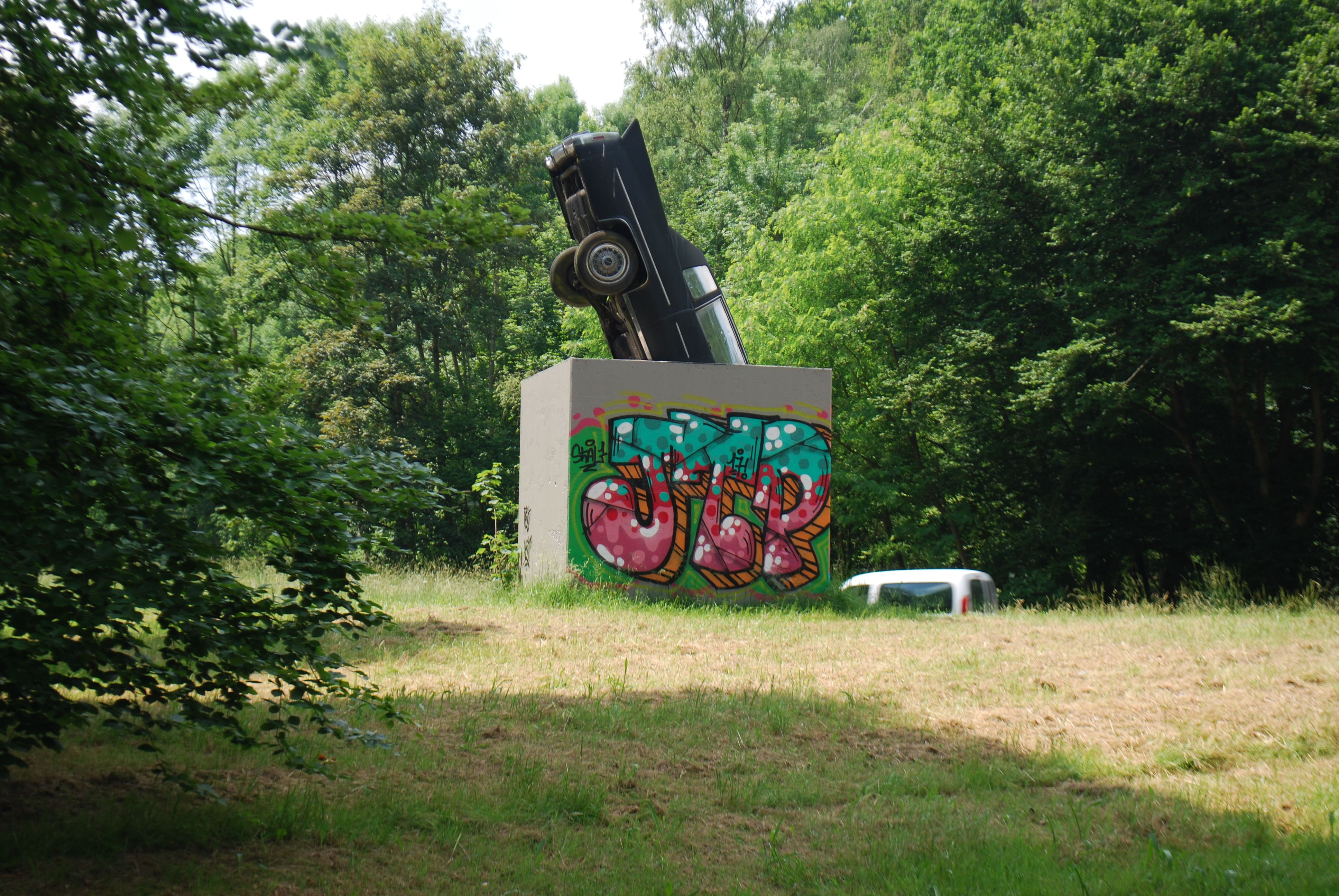 Vue du boulevard de Colonster, dans le domaine de l'université de Liège au Sart Tilman.